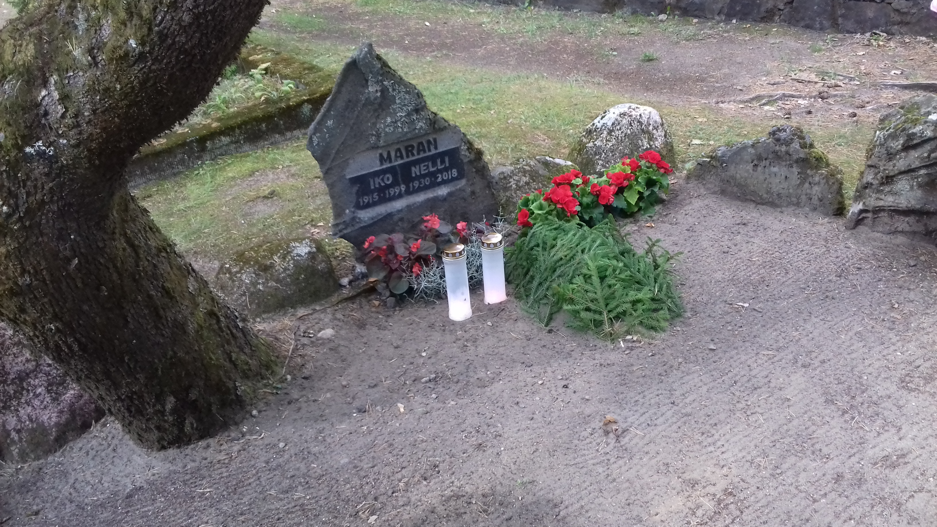 Iko ja Nelli Marani hauaplats Rahumäe kalmistul